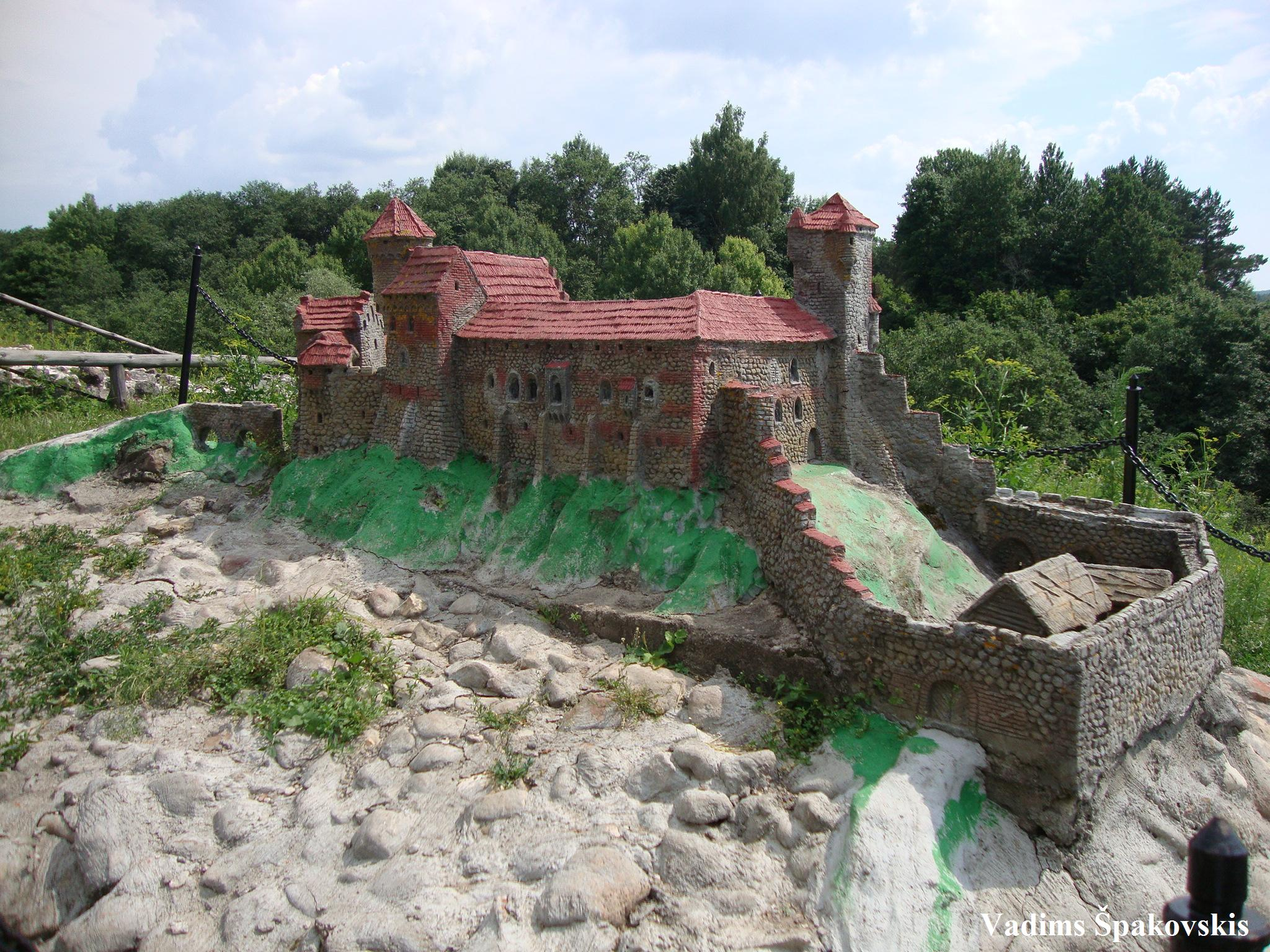 Динабургский замок. Автор И. П. Манжос, 1996 год. Макет стоит на месте старого замка в Науене. Автор: Вадим Шпаковский